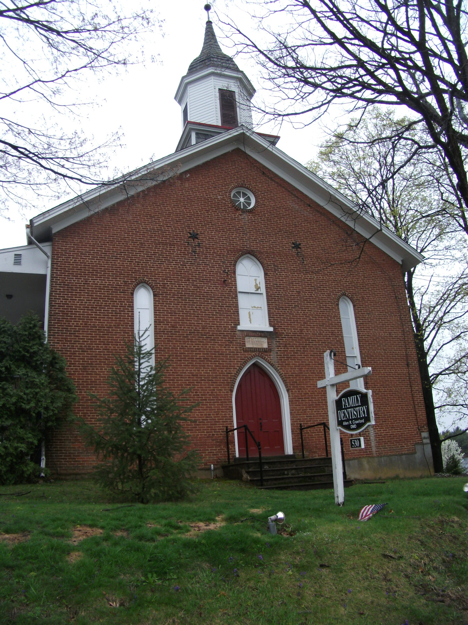 Macungie, Pennsylvania